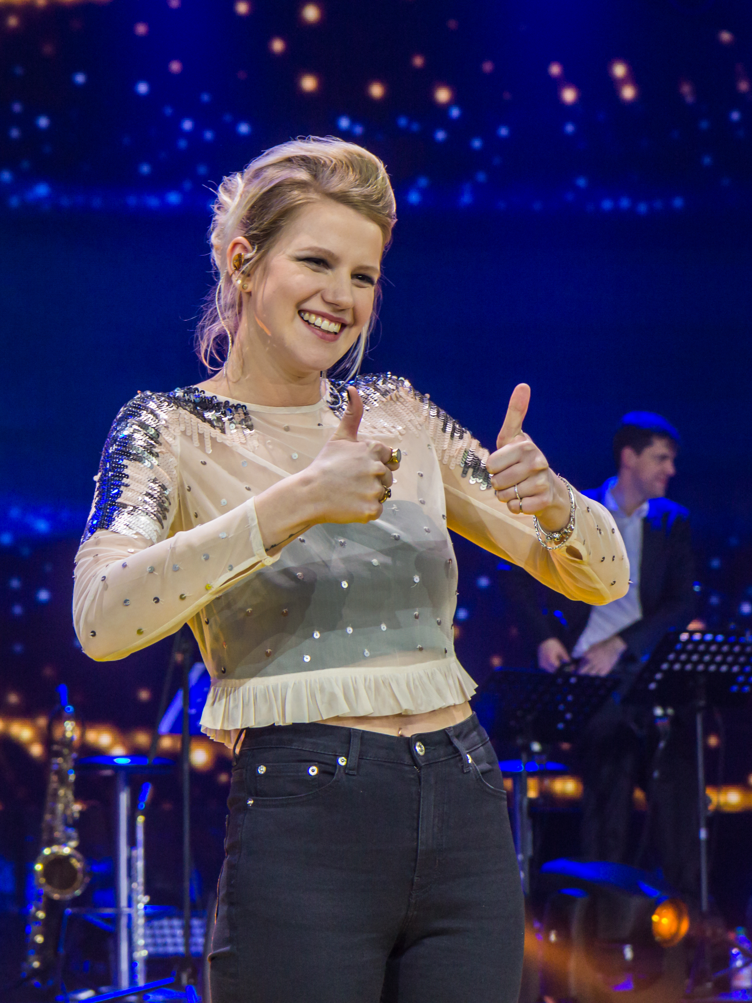 Unser Song 2017 - Glückwünsche und Pressekonferenz nach der Sendung